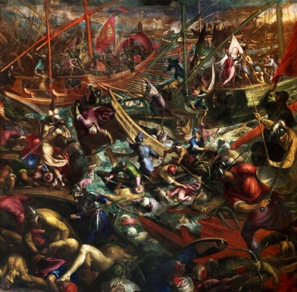 Palma il giovane